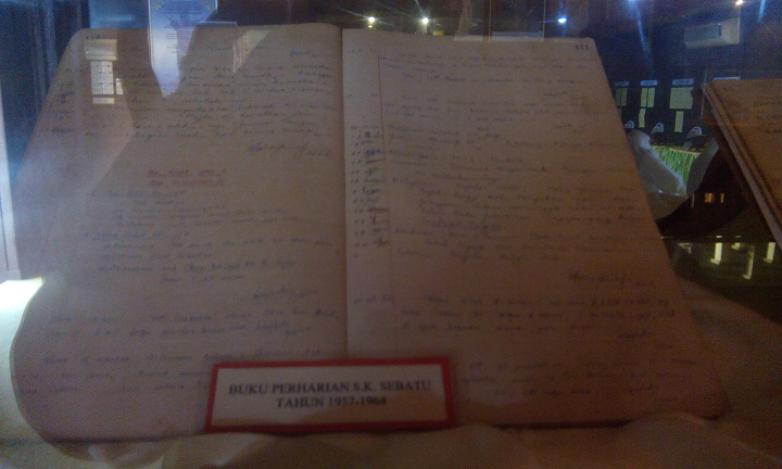 Buku Perharian Tahun 1957-1964